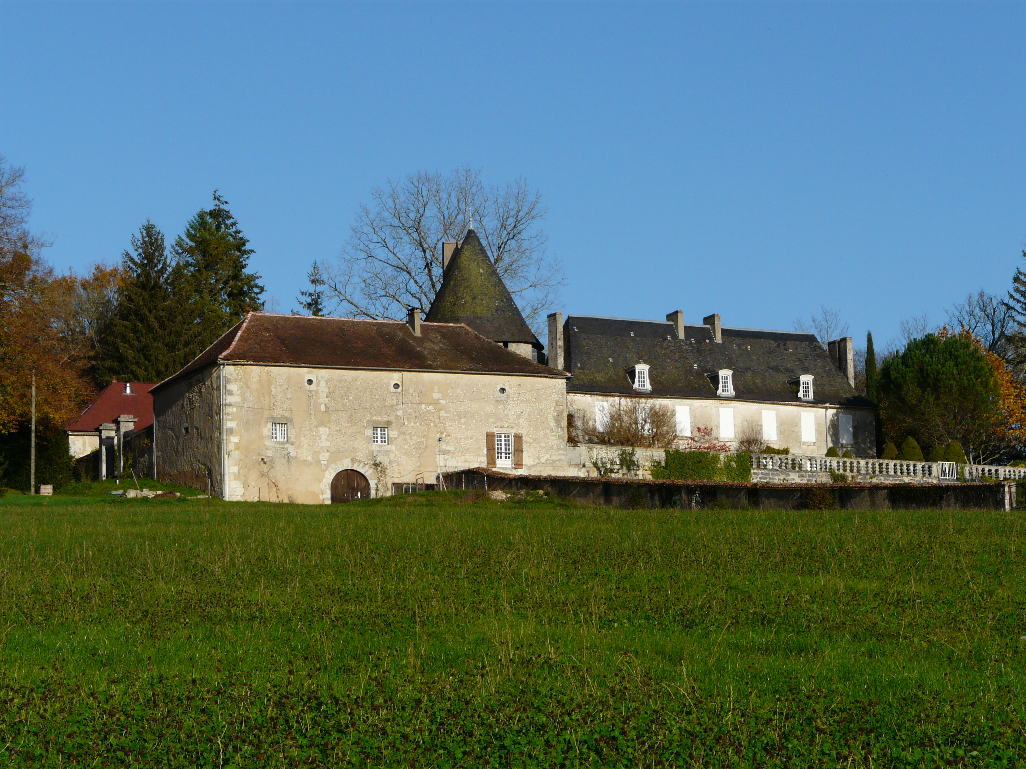 Le château de la Besse, Milhac-d'Auberoche, Dordogne, France.